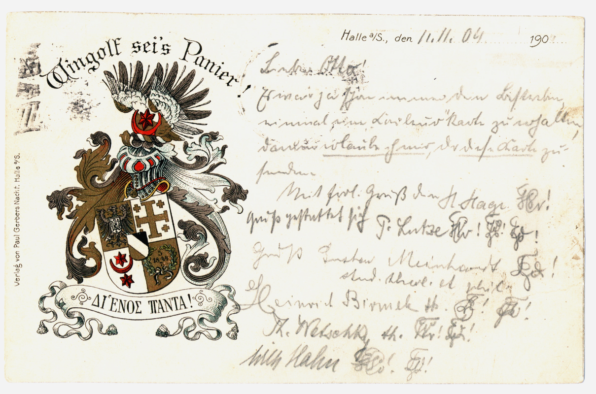 Historische Couleurkarte des Hallenser Wingolf